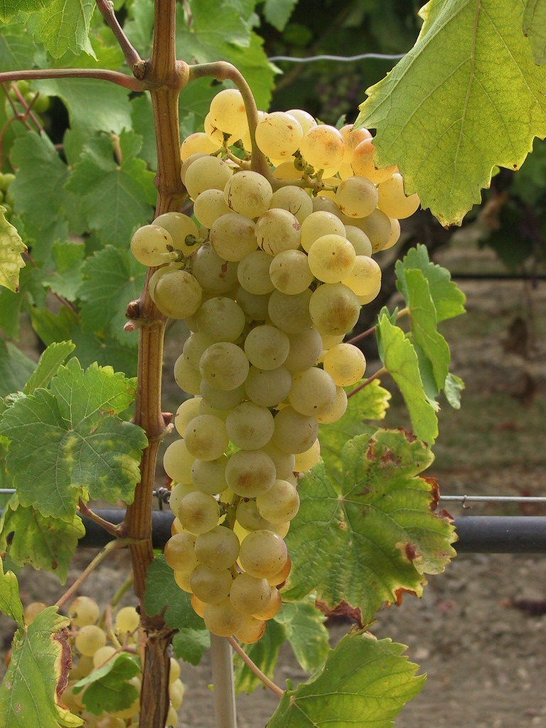 Grappe de raisin de la variété Chasselas